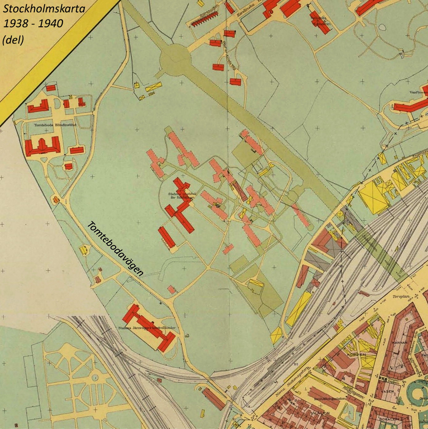 Del av Stockholmskartan visande bl. a. Tomtebodavägen